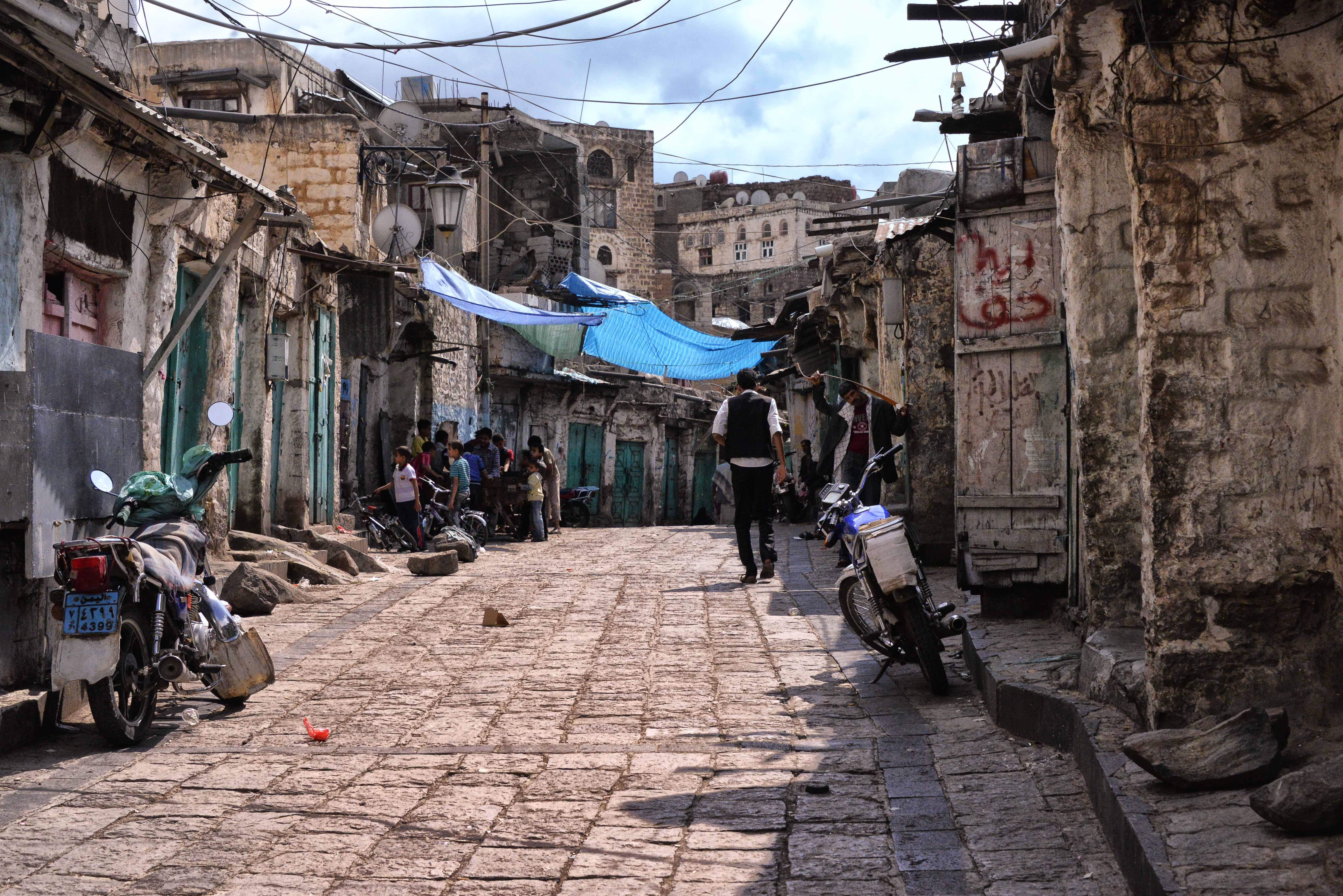 Yemen